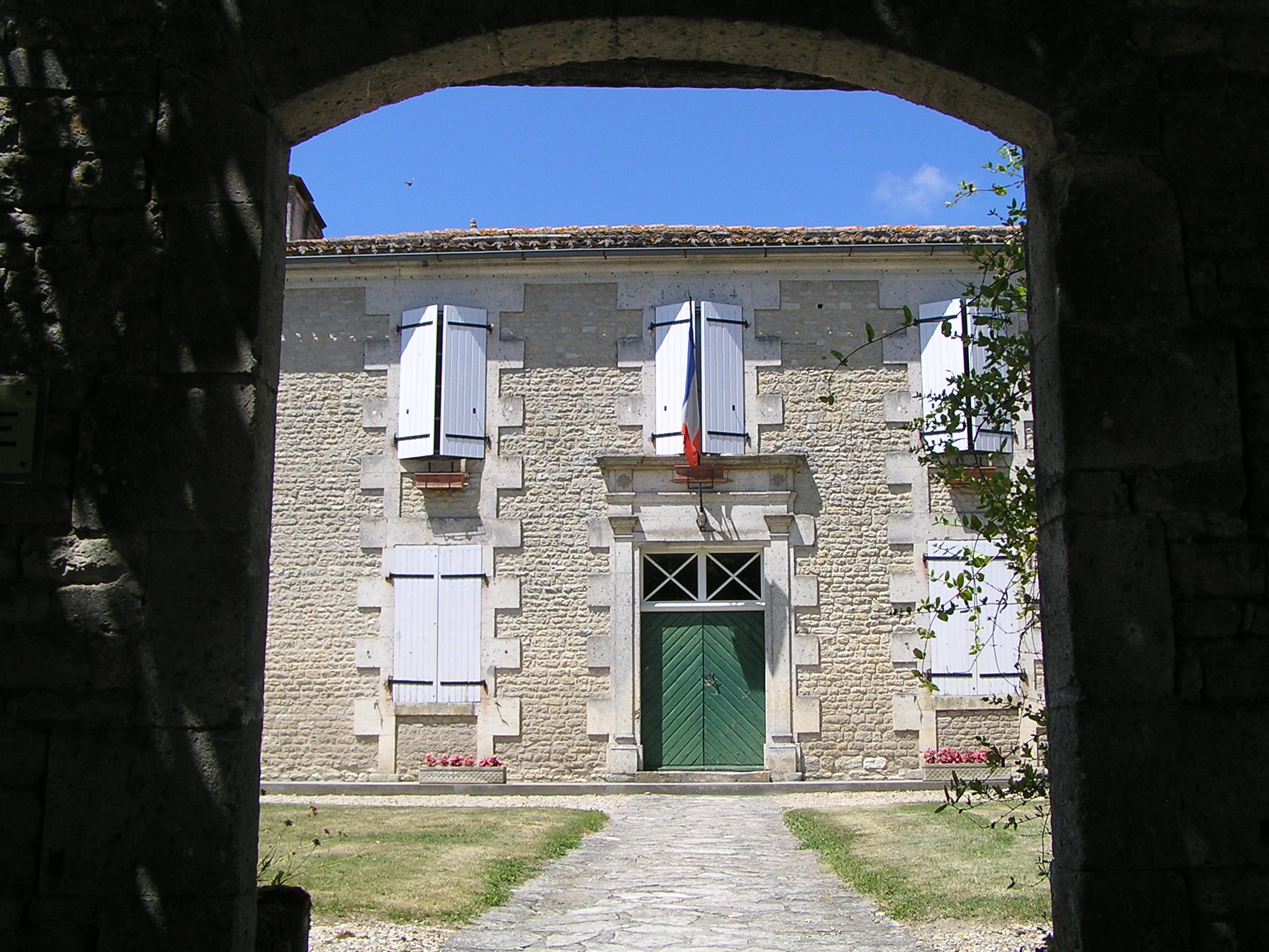 mairie de Verdille